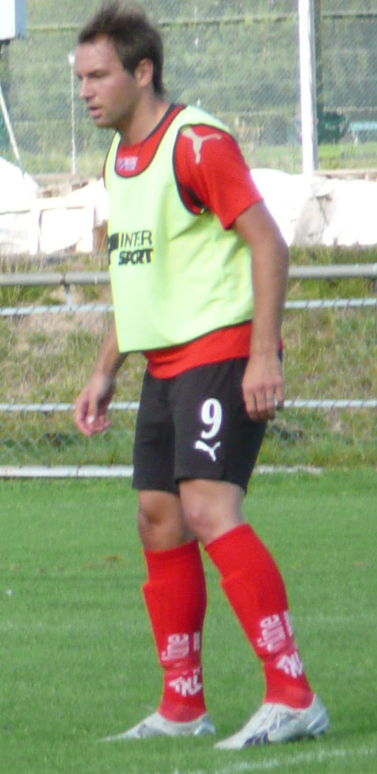 Stefan Larsson